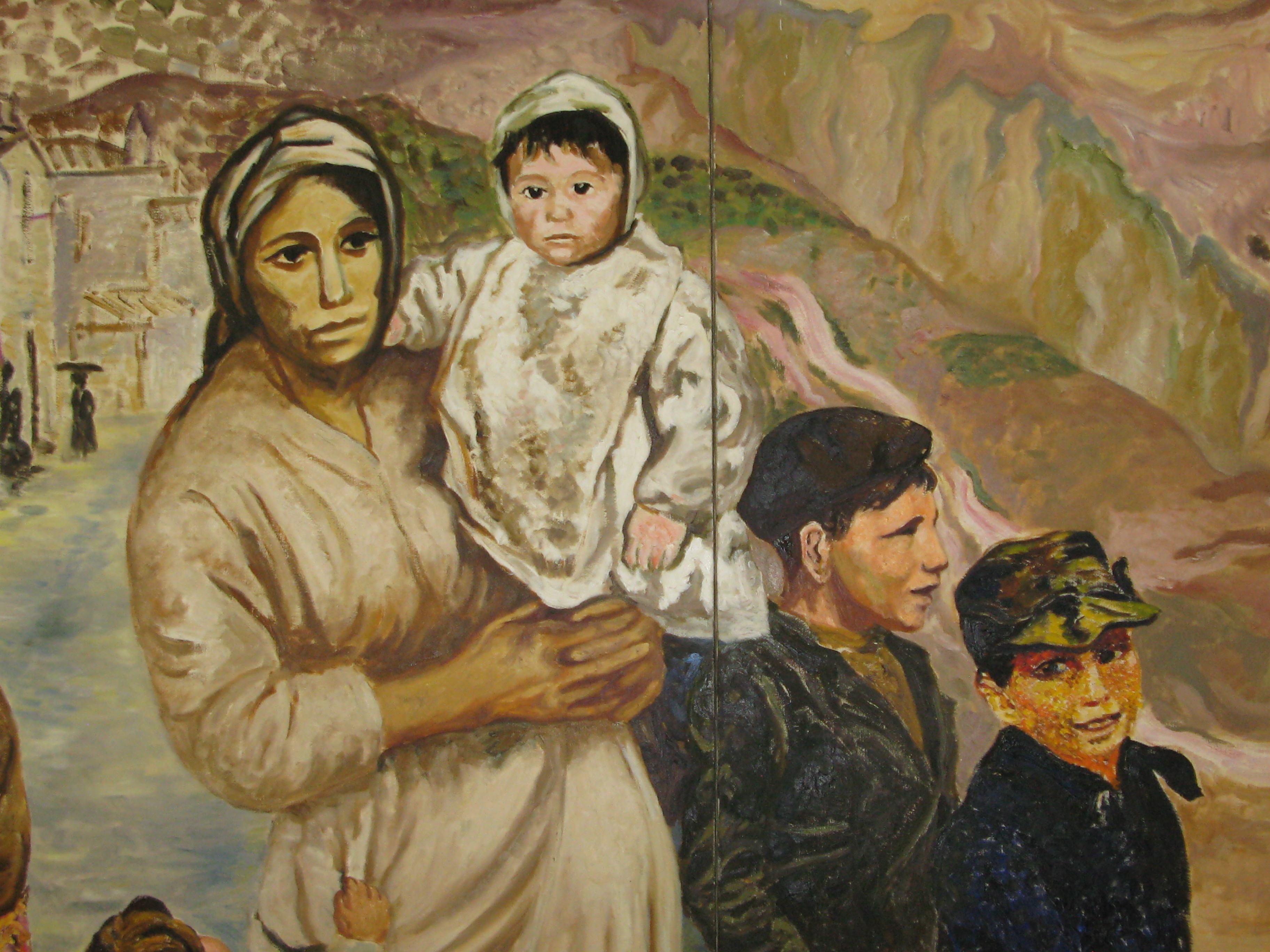 detail